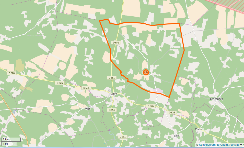 Le Sen Limite communale This map may be incomplete, and may contain errors. Don't rely solely on it for navigation.